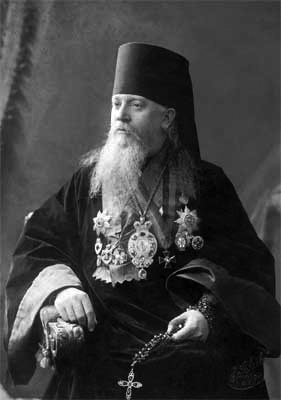 Митрополит Агафангел (в миру Александр Лаврентьевич Преображенский; 27 сентября 1854 — 16 октября 1928) — епископ Российской Церкви; митрополит Ярославский и Ростовский.